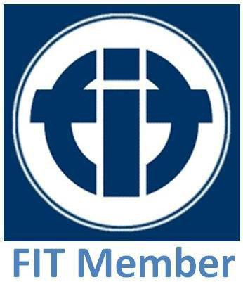 سازمان جهاني ترجمه